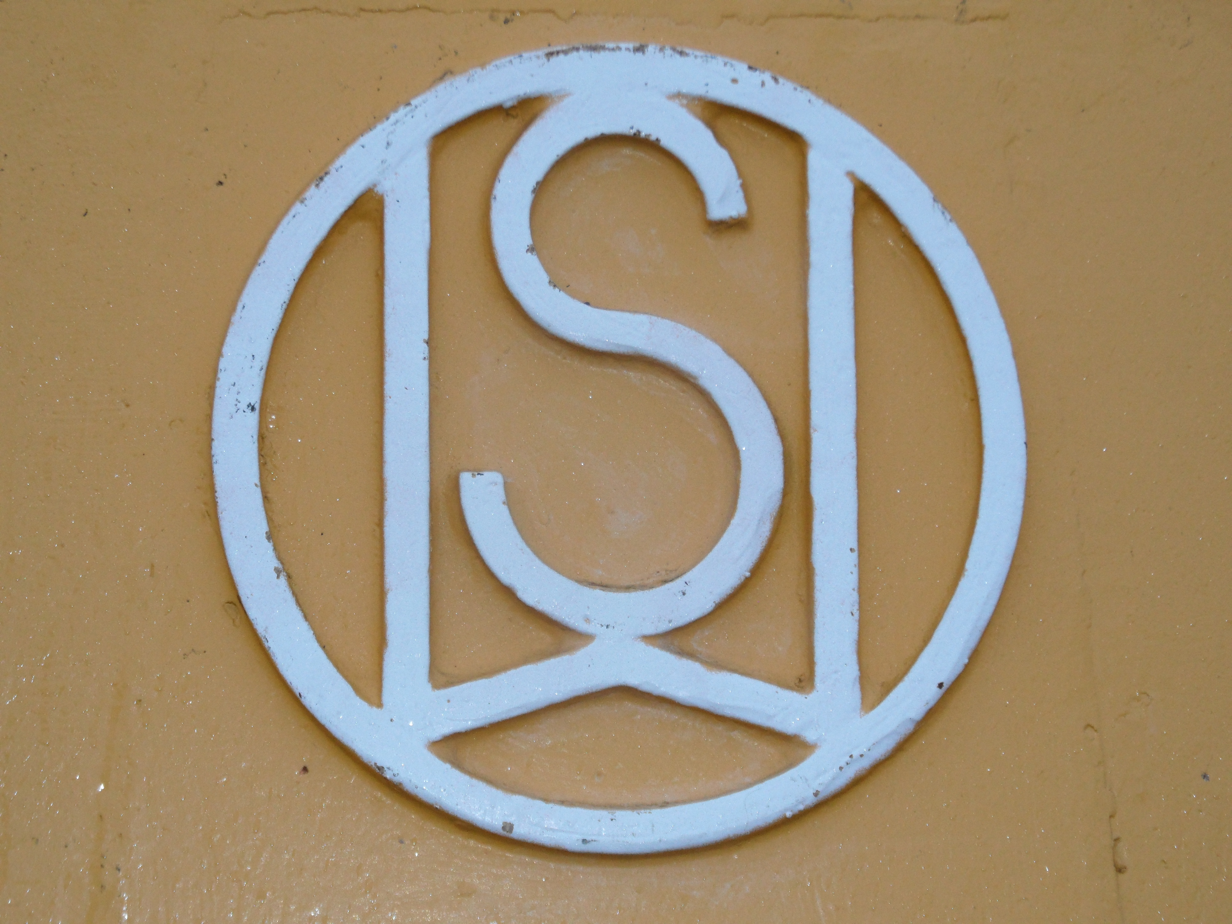 Stalowa Wola logo na dźwigu samochodowym